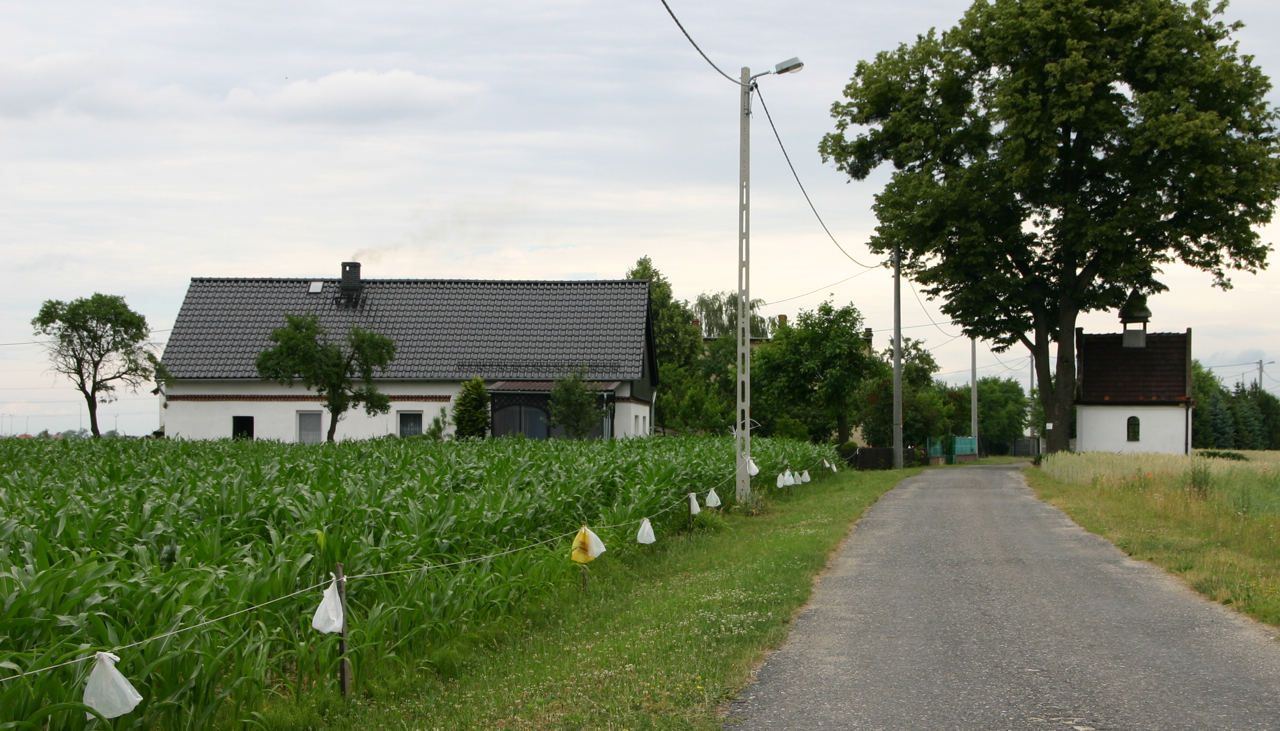 Posiłek – wieś w Polsce położona w województwie opolskim, w powiecie krapkowickim, w gminie Krapkowice. Object location50° 31′ 29″ N, 17° 54′ 49″ E